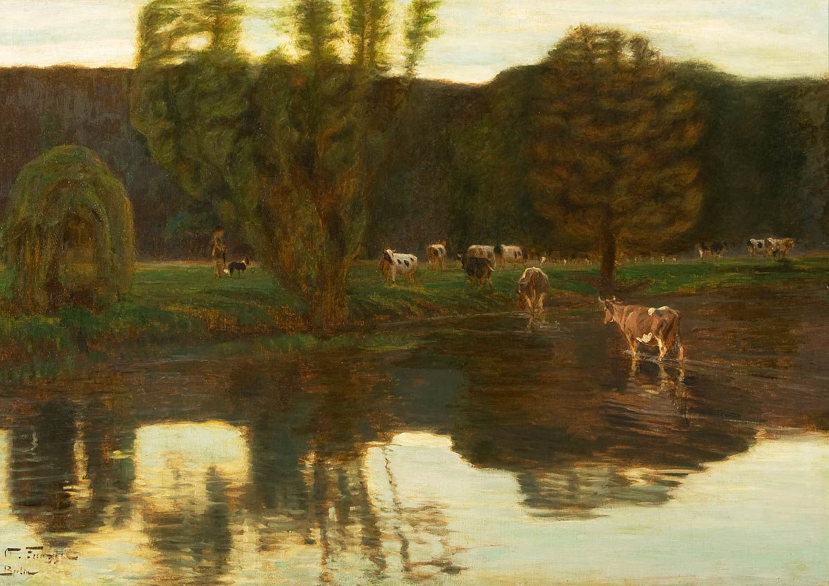 Kühe an einer Furt. Öl auf Leinwand. 70 x 100.5 cm. Signiert und bezeichnet "Berlin". Etikett der Großen Berliner Kunstausstellung 1908.